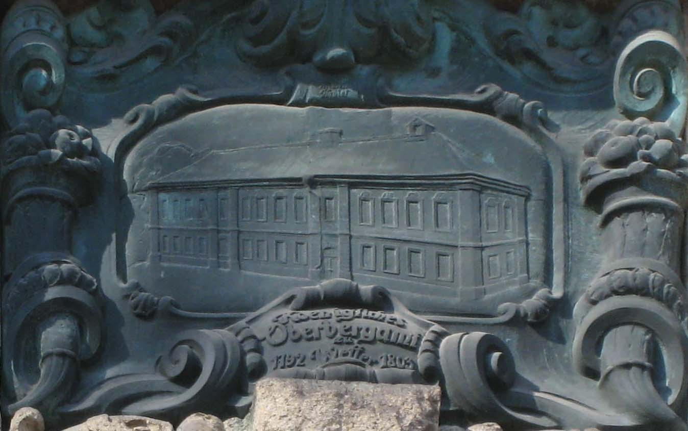 Landesoberbergamt Dortmund, Fassadendetails – Darstellung Koenigliches Oberbergamt zu Wetter 1792–1803